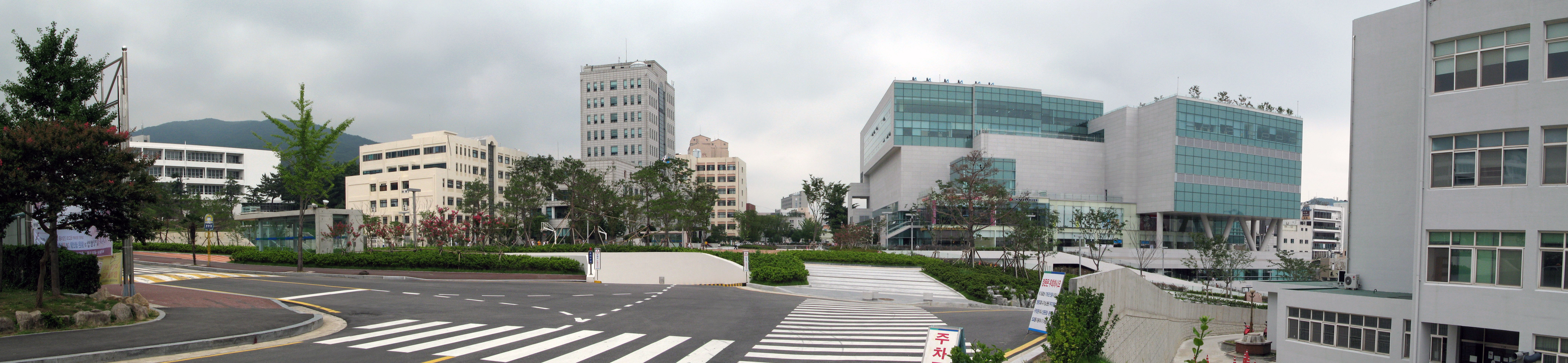 부산대학교 장전캠퍼스 제도관에서 찍은 파노라마 사진 ,사진 여러장을 이어 붙여 만들었다.